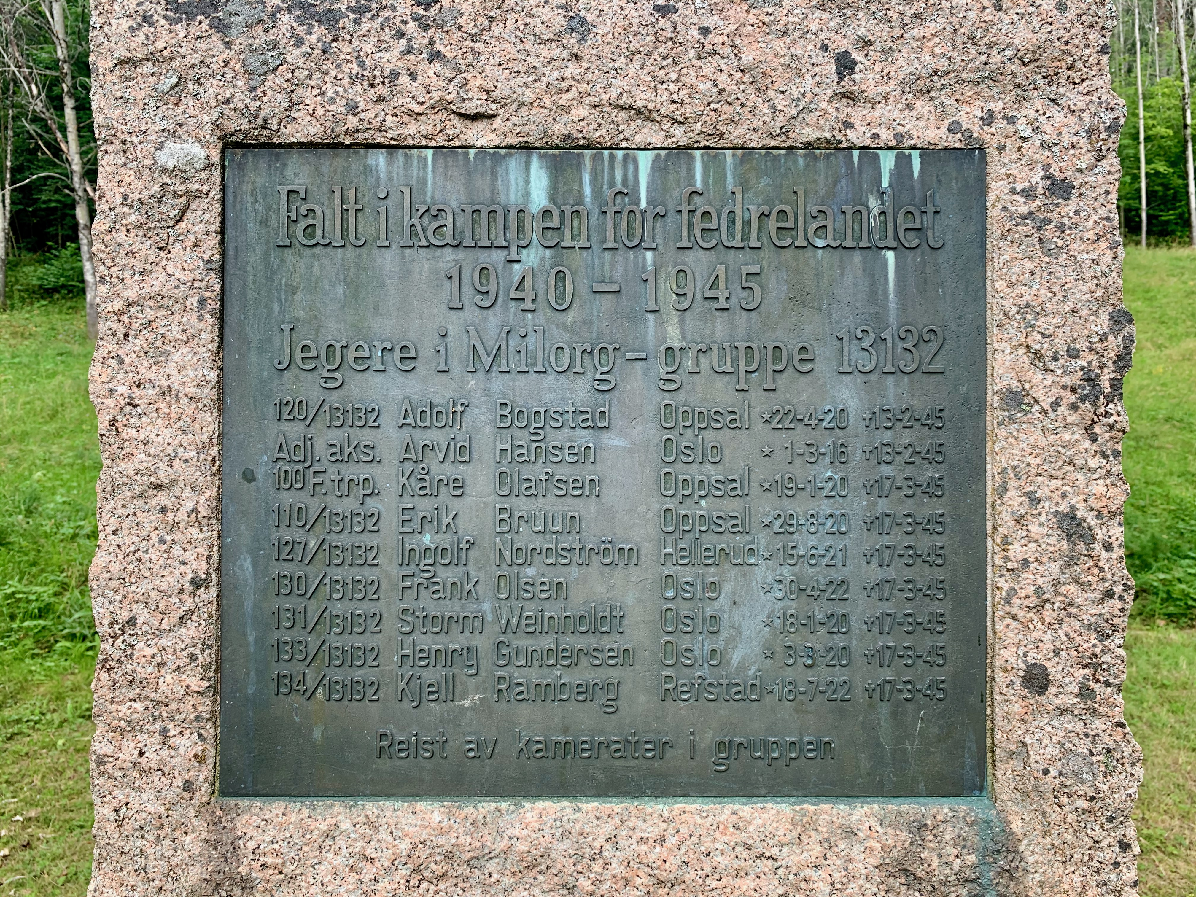 Krigsminnesmerke ved Sarabråten. Østmarka i Oslo.